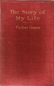 The Story of My Life, London, Chapman & Hall, 1905